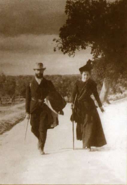 Ramón Menéndez Pidal y María Goyri en su viaje de novios por la ruta del Cid